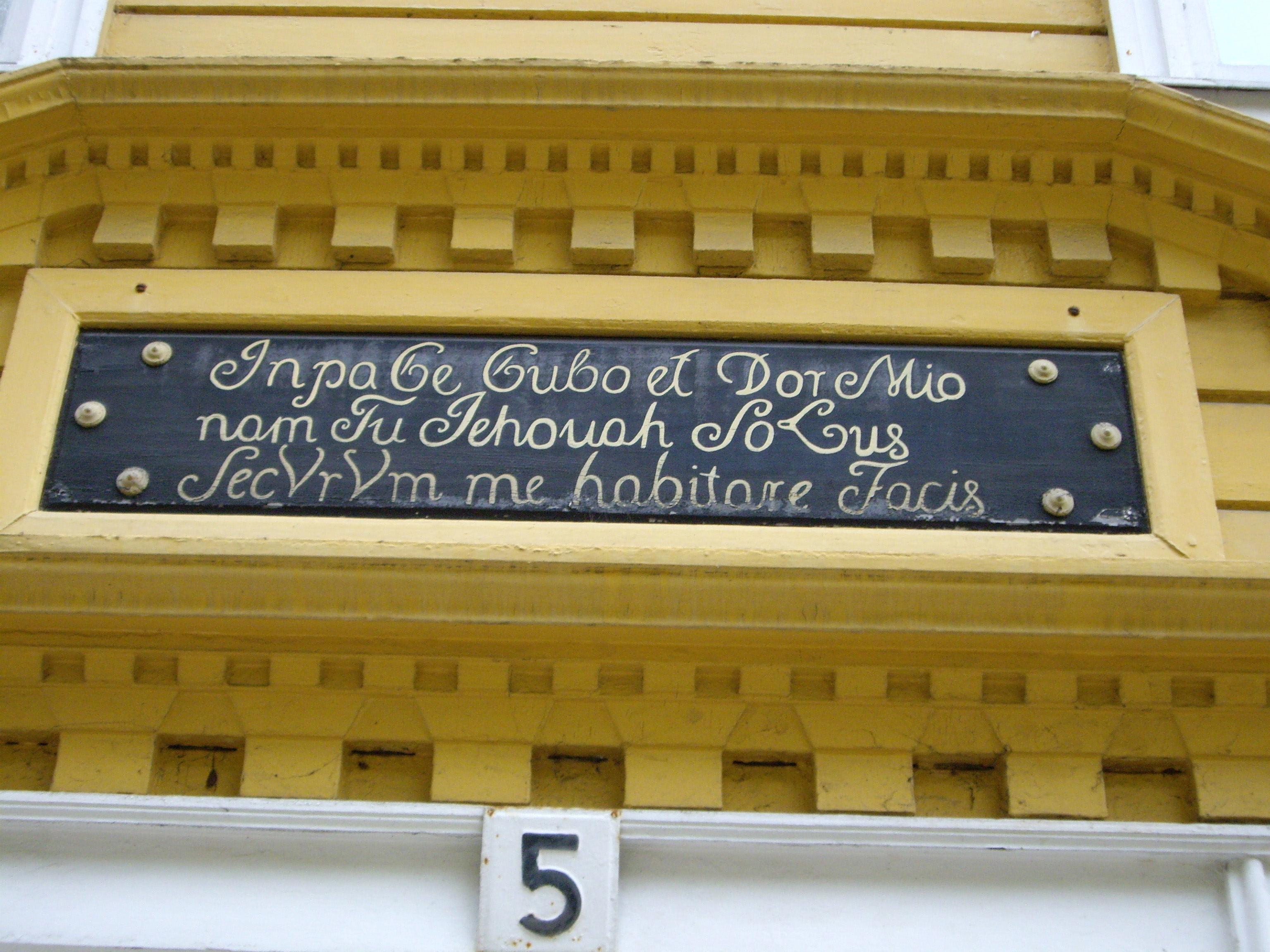 Skylt ovanför entrén på Zetterlöfska husetLatina: InpaCe Cubo et Dormio nam Tu Iehoua SoLus SecVrVm me habitare Facis = In ̲pace Cubo et Dormio nam tu Iehoua Solus Securum me habitare Facis